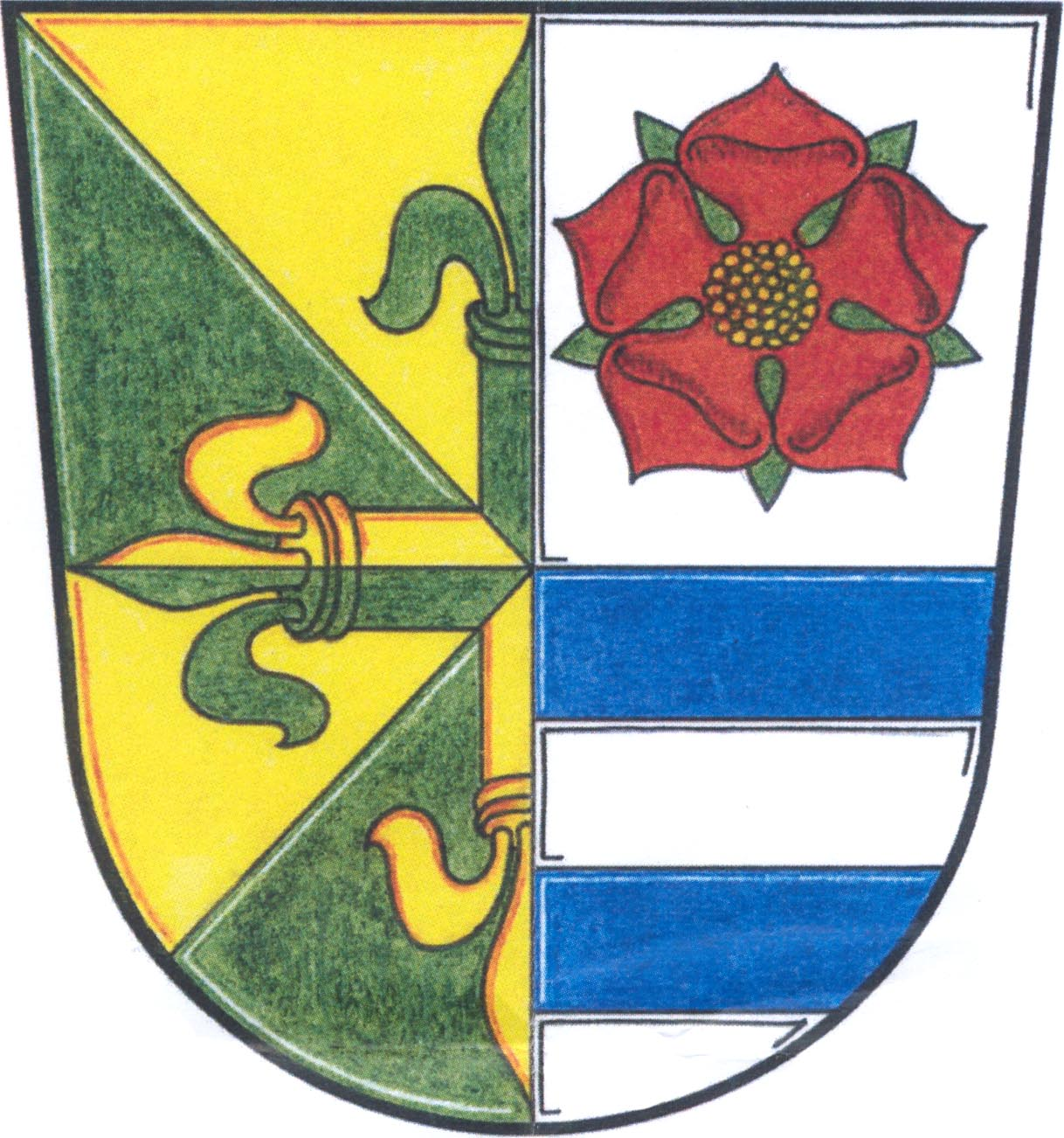 Znak obce Dynín